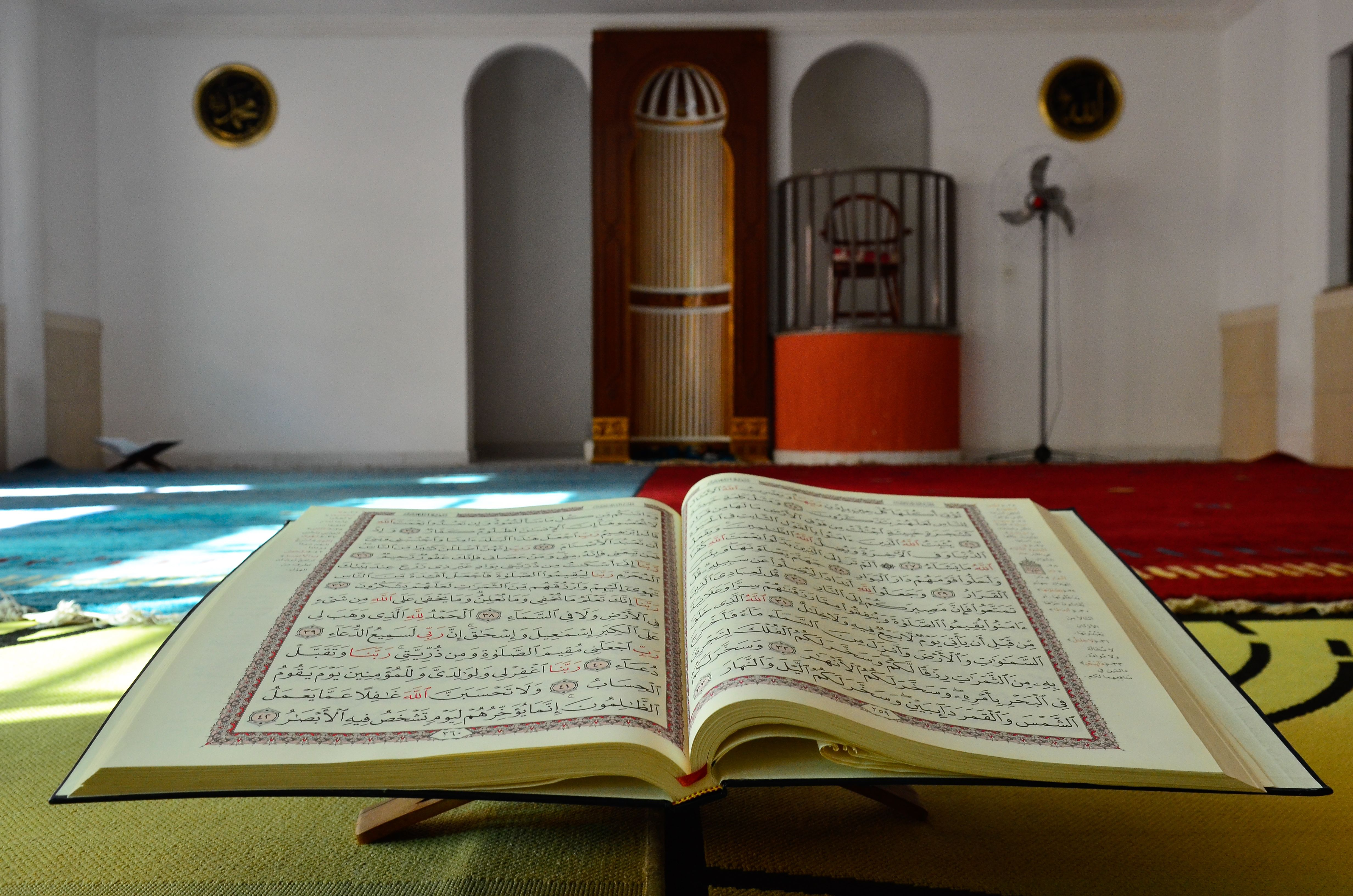 Alcorão aberto.